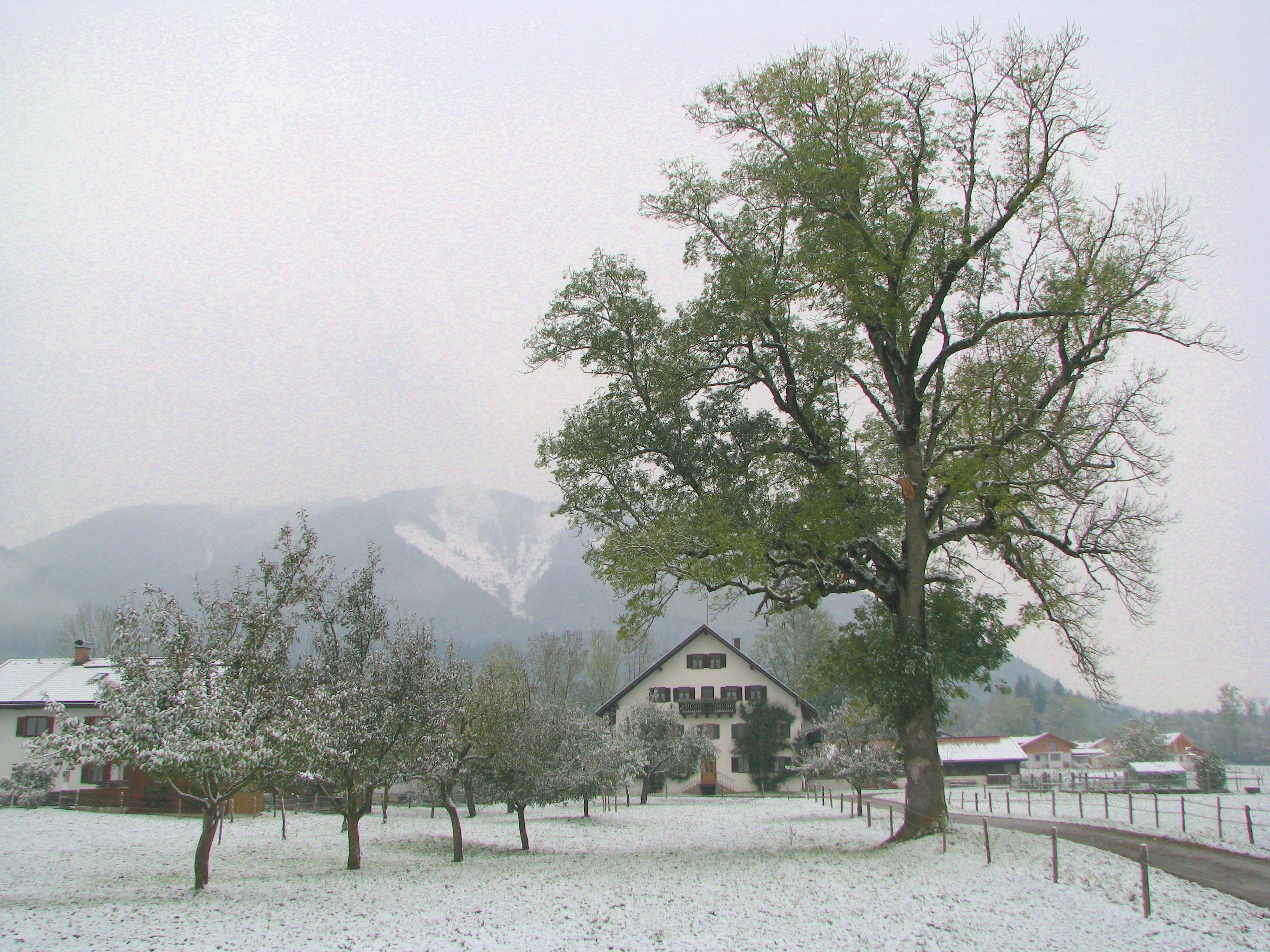 Bauernhof am Ortsrand von Grafenaschau mit altem Baum. Im Hintergrund der Rißberg (1430 m) im Ammergebirge.